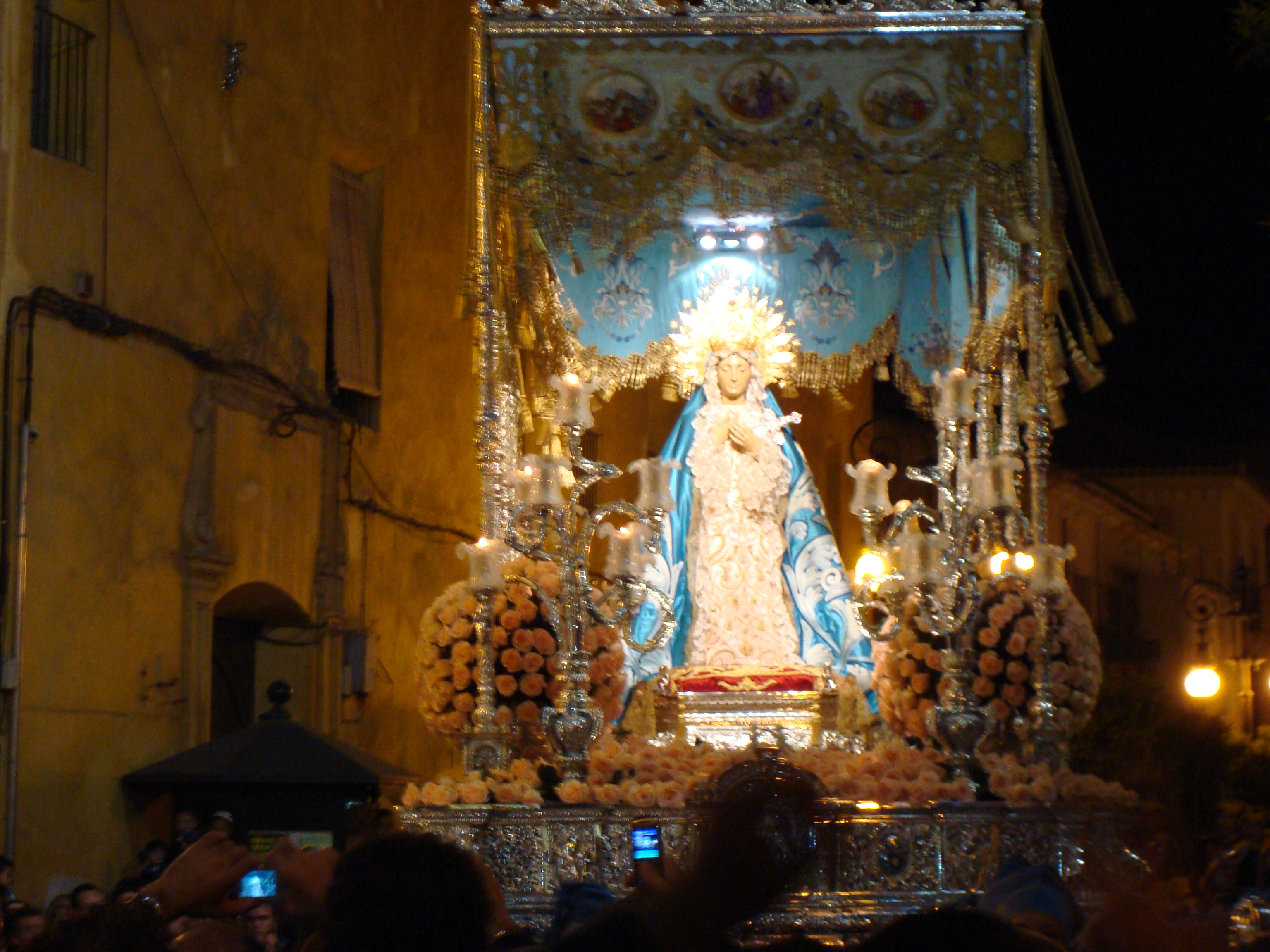 Salida de San Francisco de la Virgen de los Dolores, Paso Azul, Semana Santa de Lorca